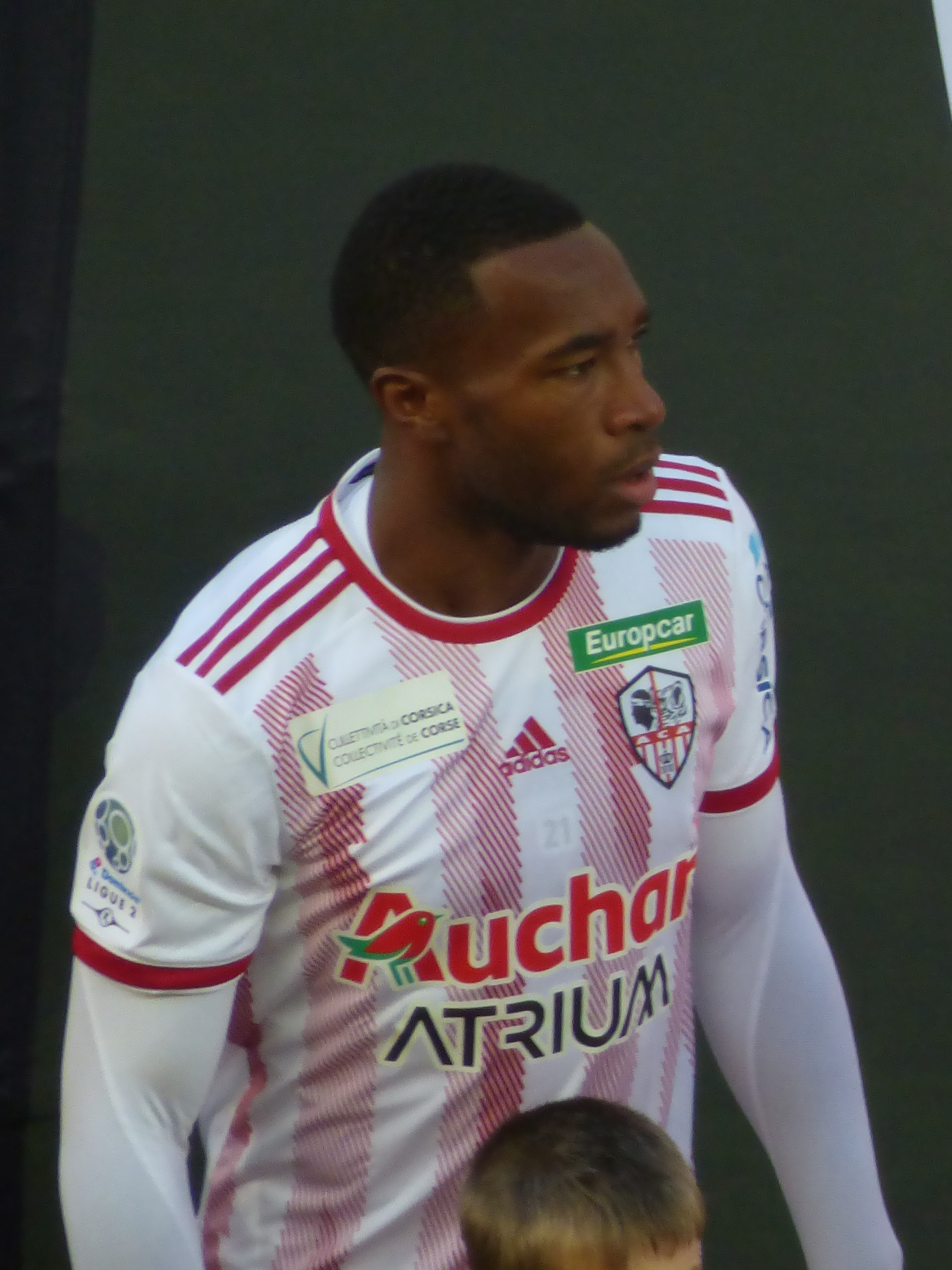 Match RC Lens - AC Ajaccio, comptant pour la dix-neuvième journée du championnat de France de Ligue 2 2018-2019, le 22 décembre 2018, au Stade Bollaert-Delelis de Lens.